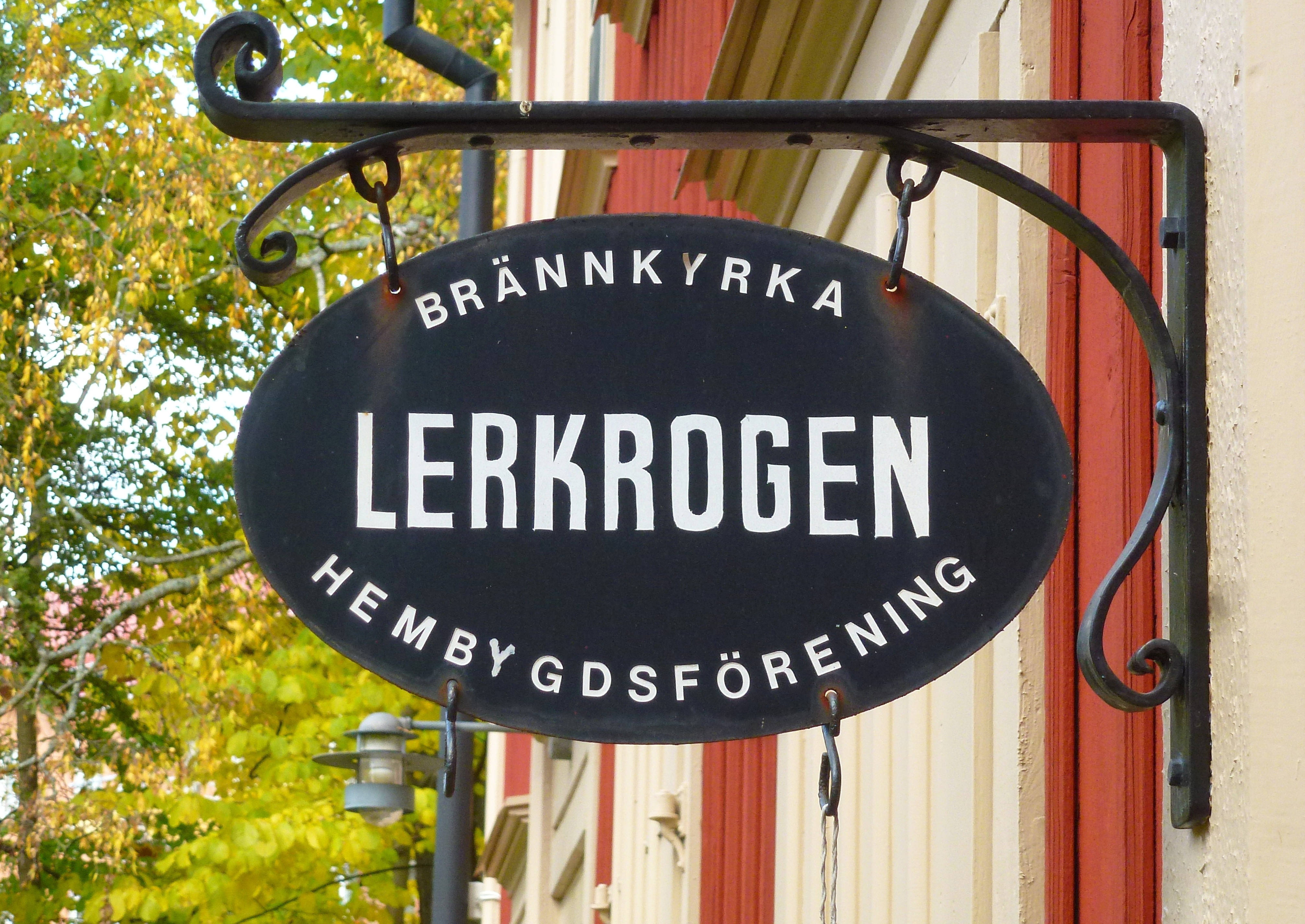 Lerkrogen